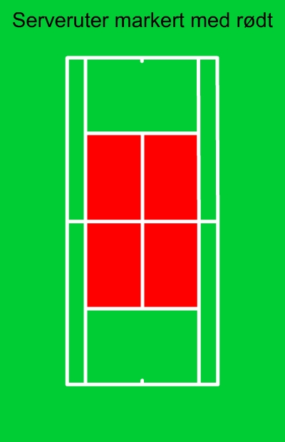 serverute